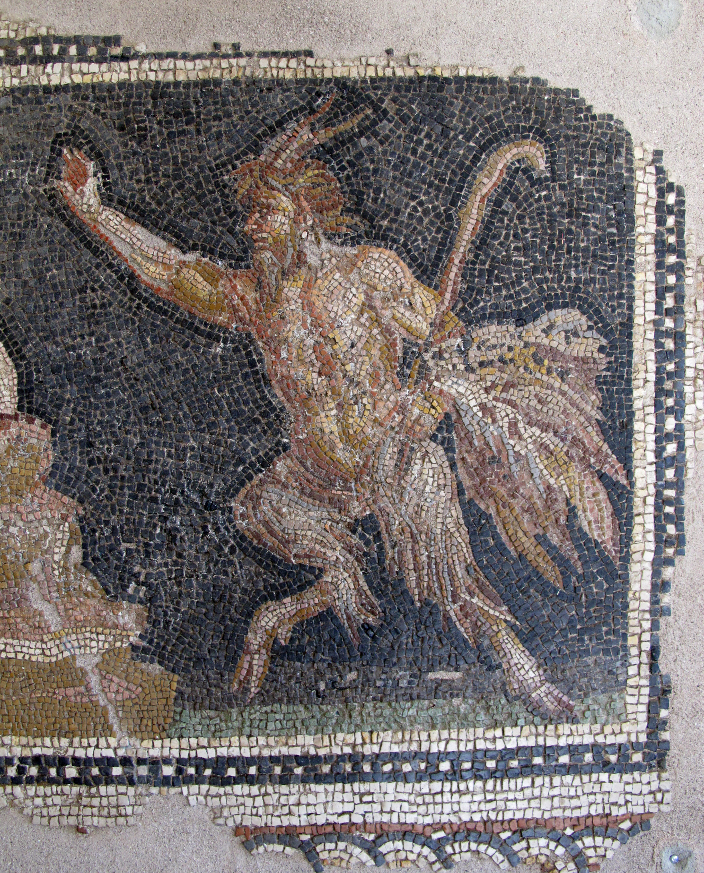 Arte romana, mosaico con eros